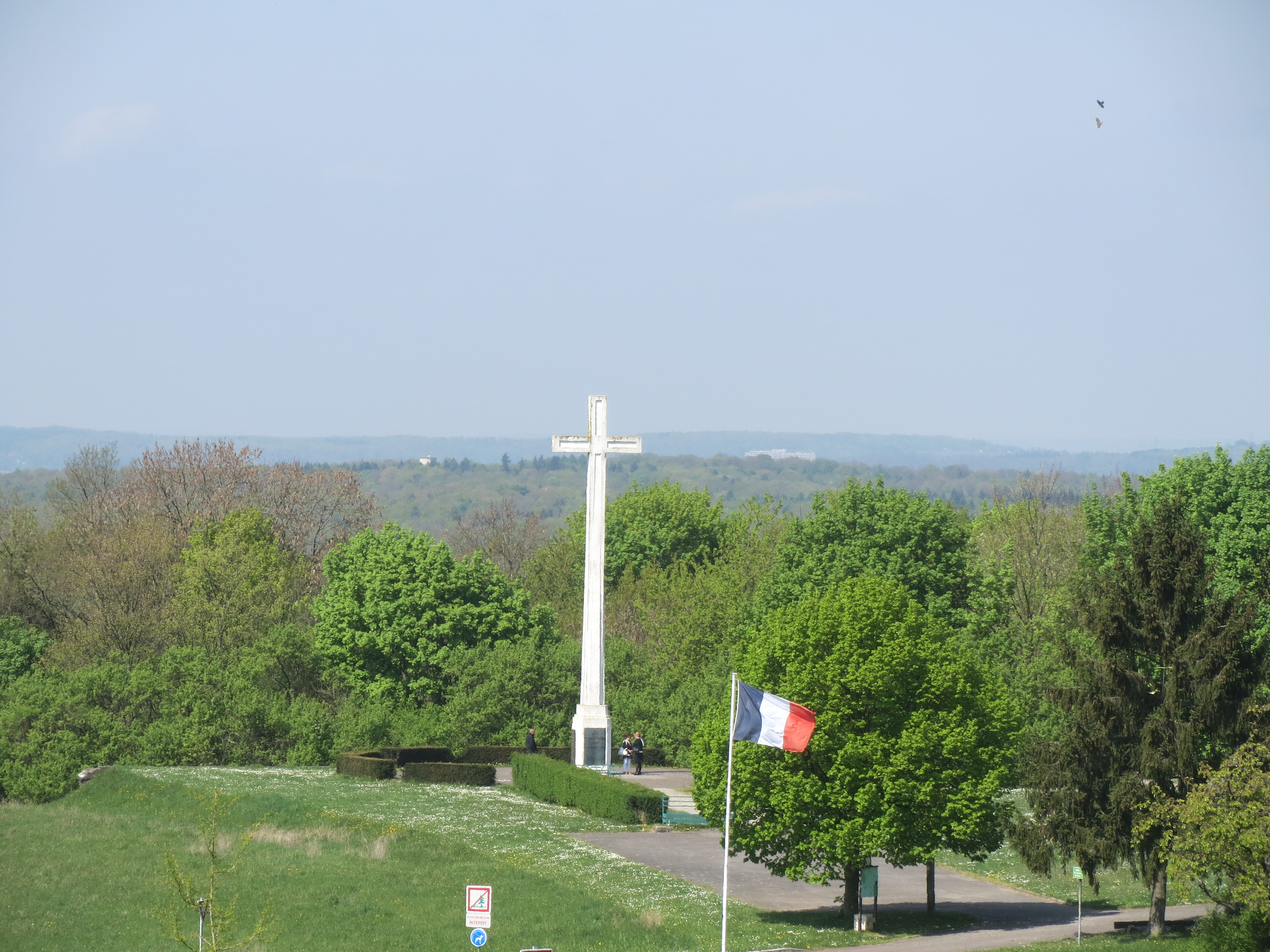 Gedenkstätte an die Schlacht am 6. August 1870 in Spicheren